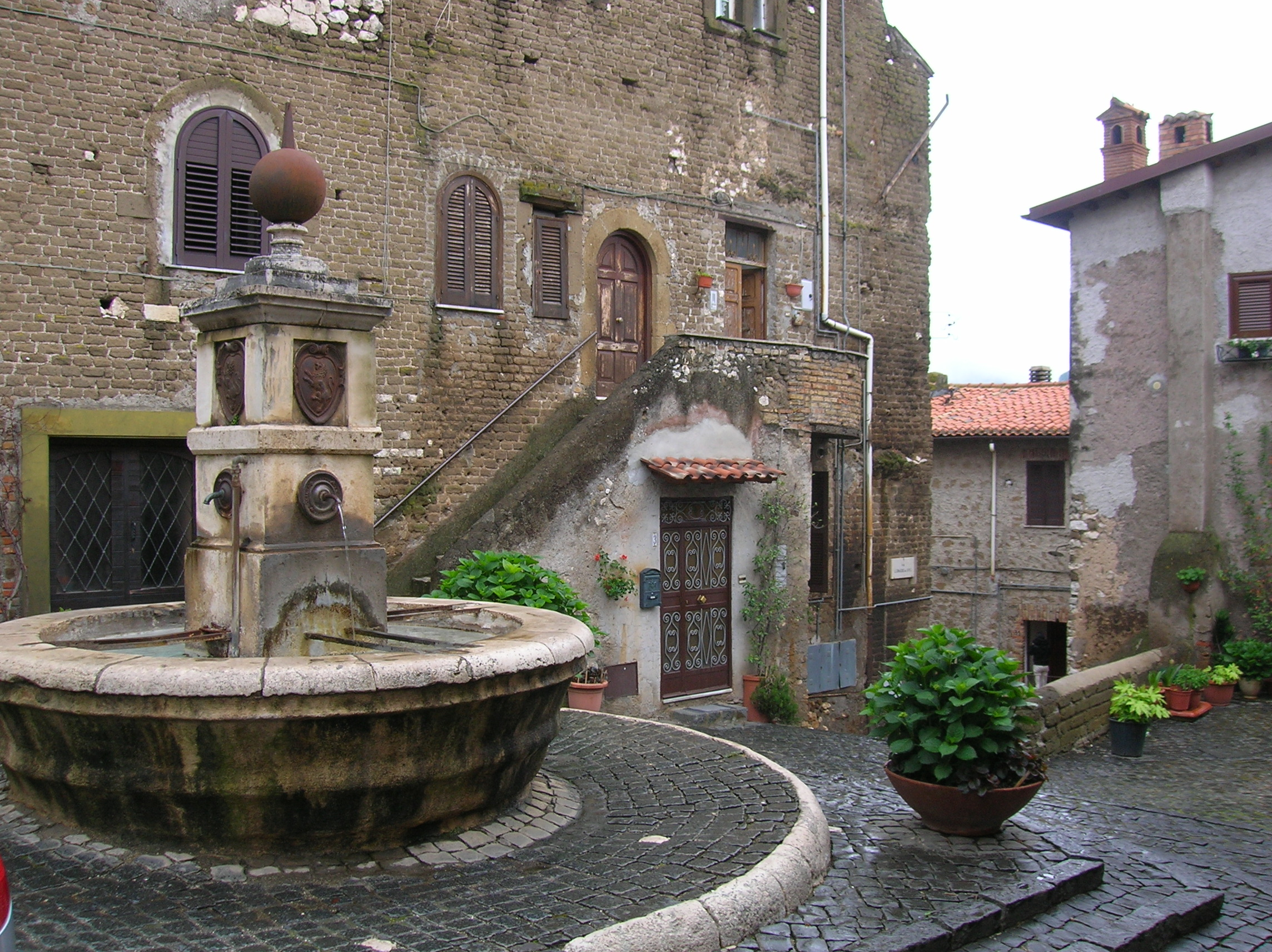 Cori, Lazio, Italia.